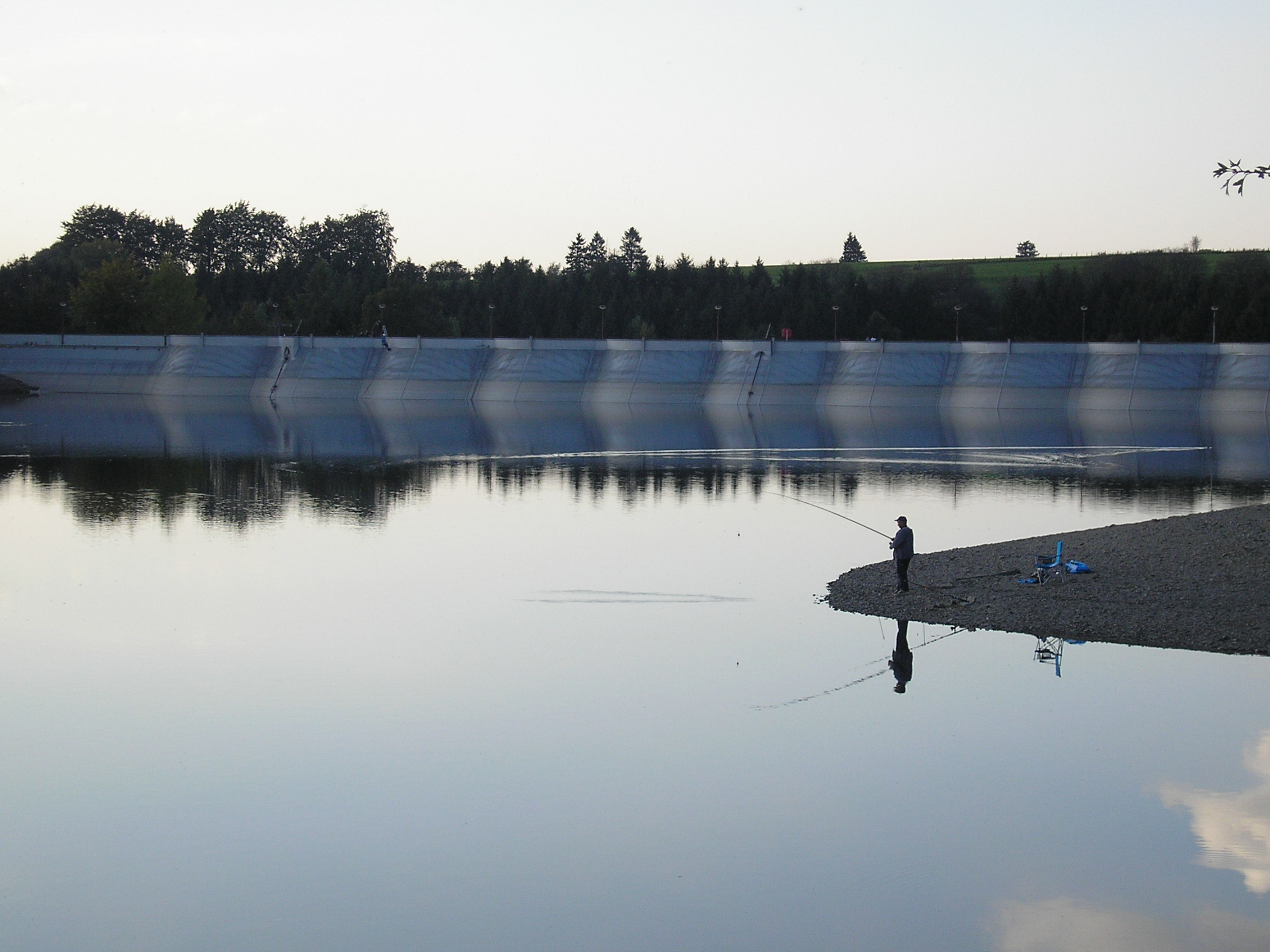 Abend am Bütgenbacher See, Ost-Belgien, Blick auf die Staumauer